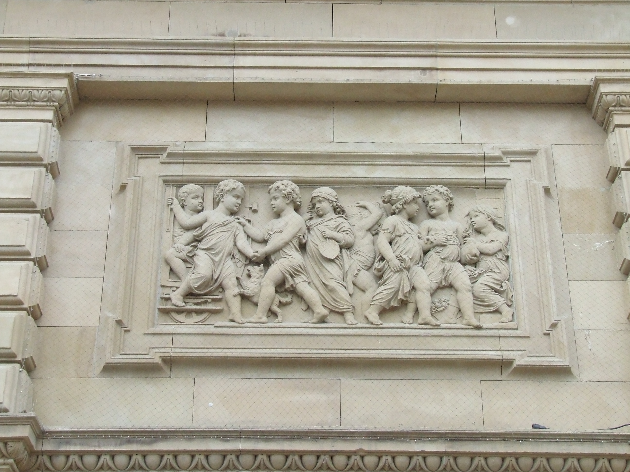 Mainz Hauptbahnhof in Mainz. Central Station, Mainz, Germany